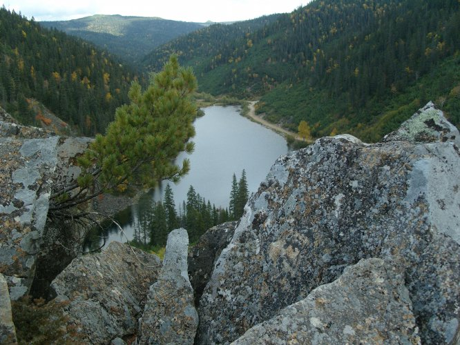 Amut lake, Khabarovsky Krai, Russia License on Flickr (2012-06-28): CC-BY-SA-2.0 Flickr tags: nature, lake